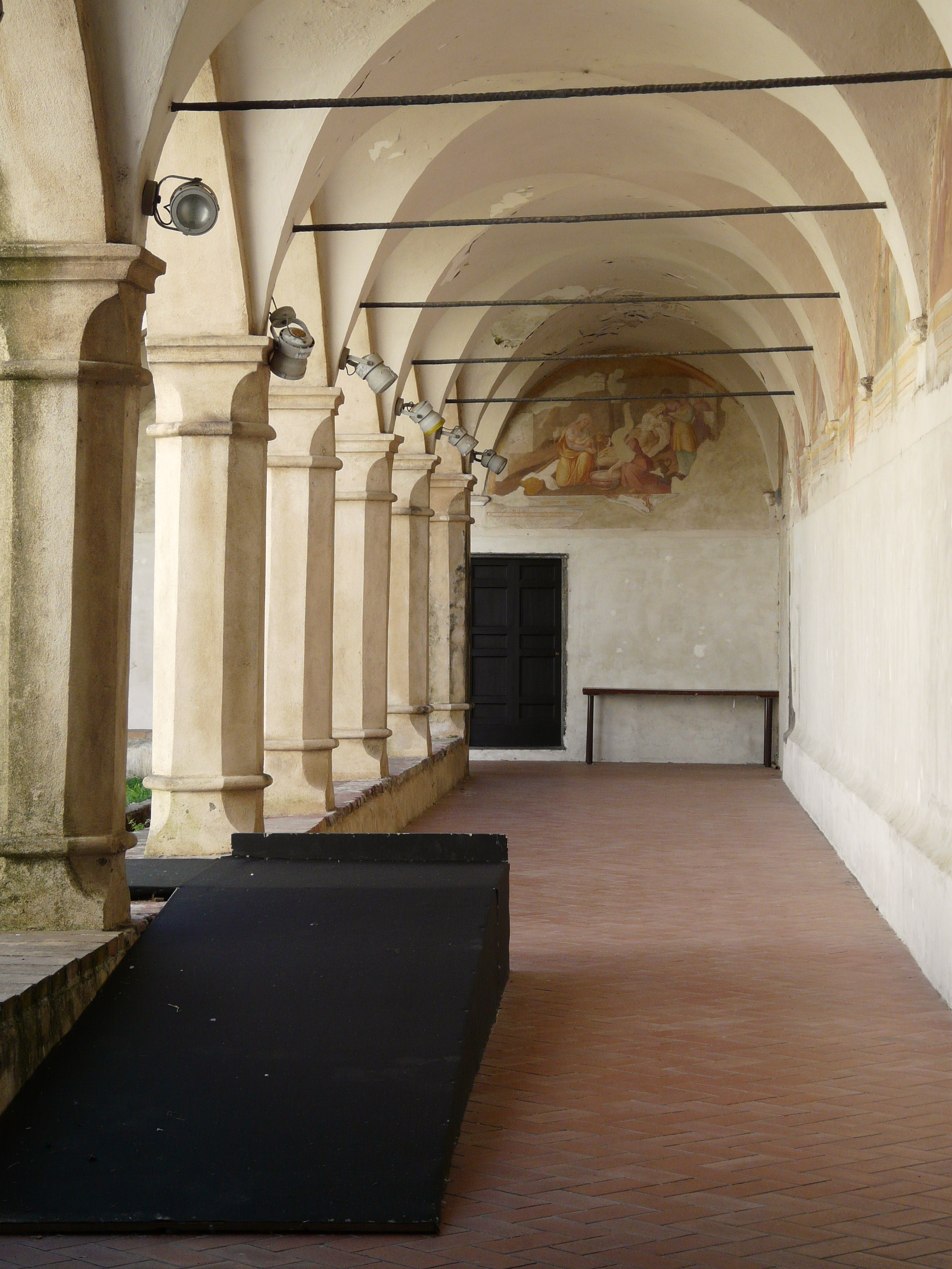 Chiesa, convento e chiostro di San Francesco, Sarzana, Liguria, Italia